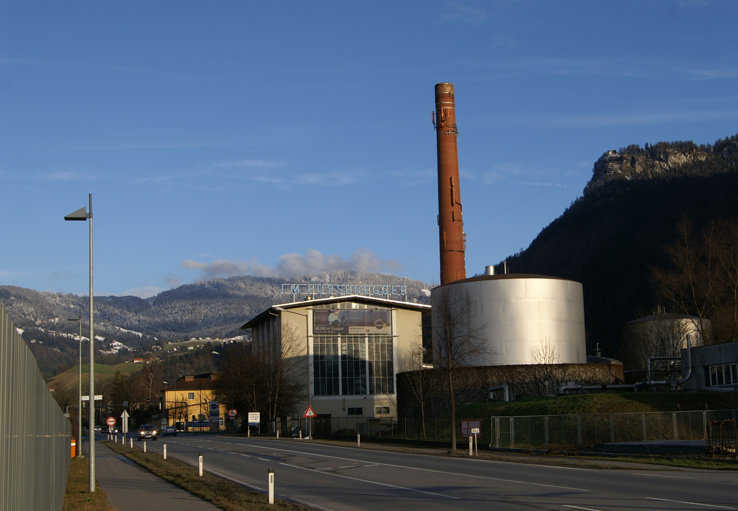 IM Fussenegger Textilfabrik in Dornbirn mit Blick auf den Karren (Berg).